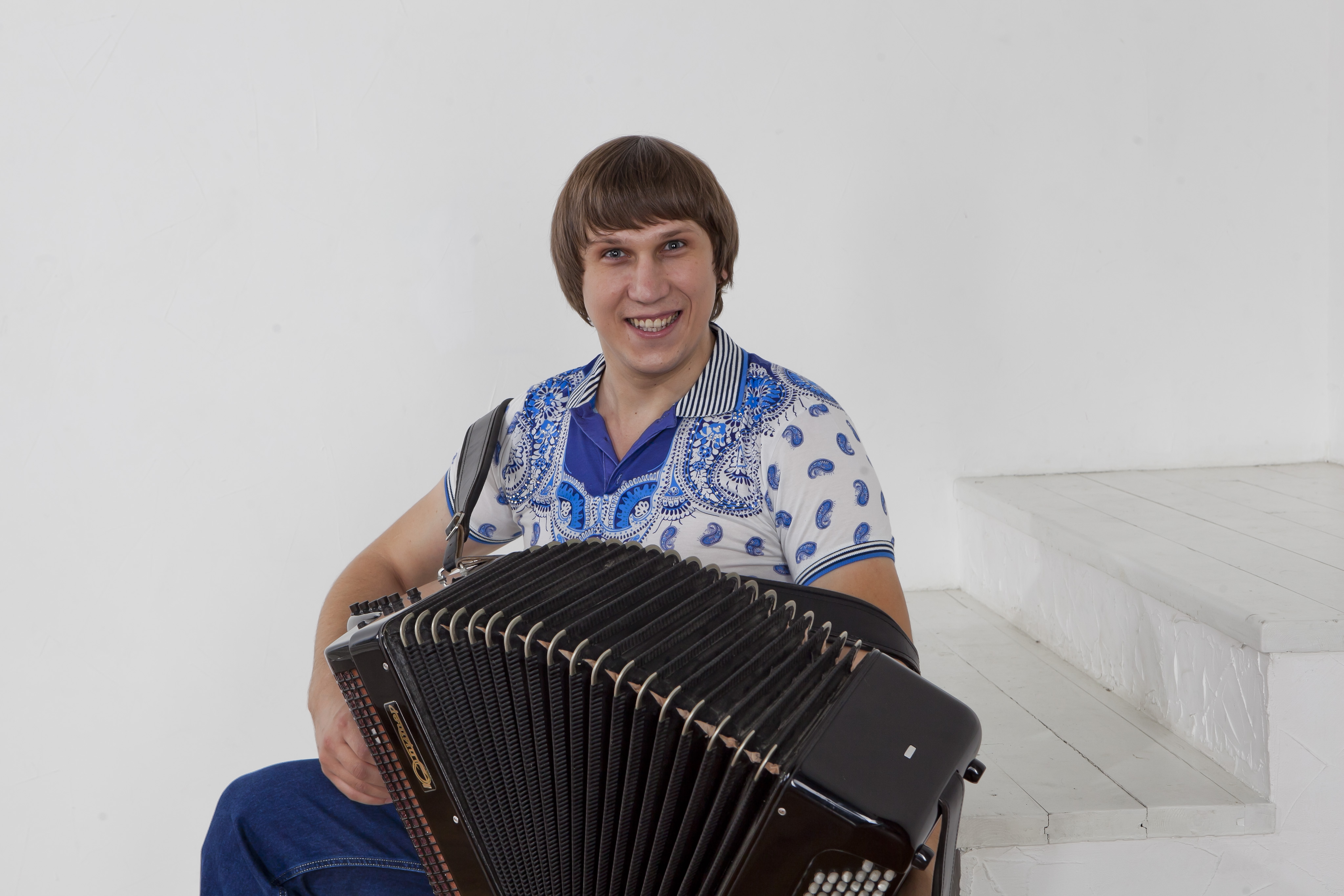 Пётр Владимирович Матрёничев - известный российский баянист, певец